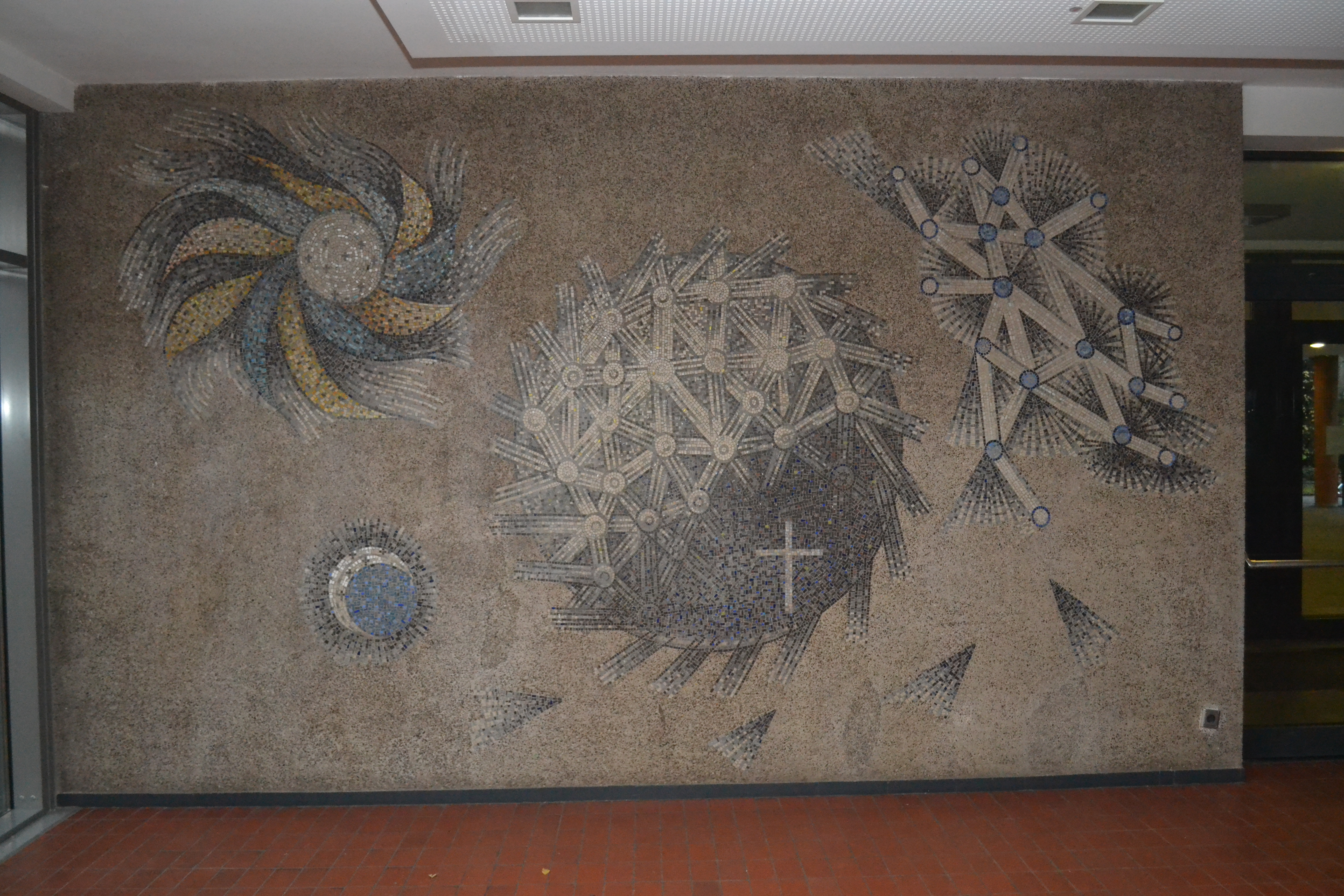 Mosaik "Makrokosmos" von Günter Grote (1955) Eingangshalle des Humboldt-Gymnasiums Düsseldorf